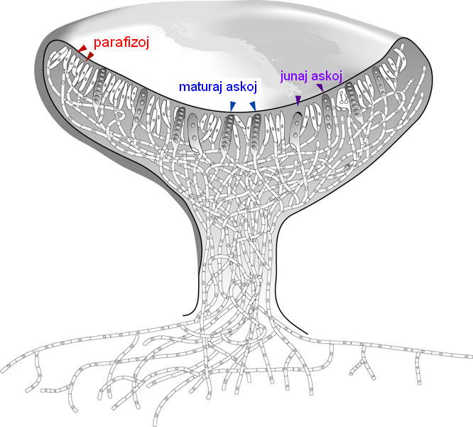 Apotecio.